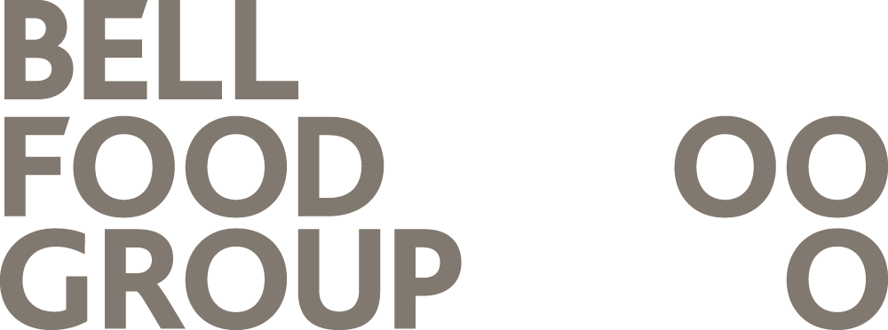 Logo Bell Food Group